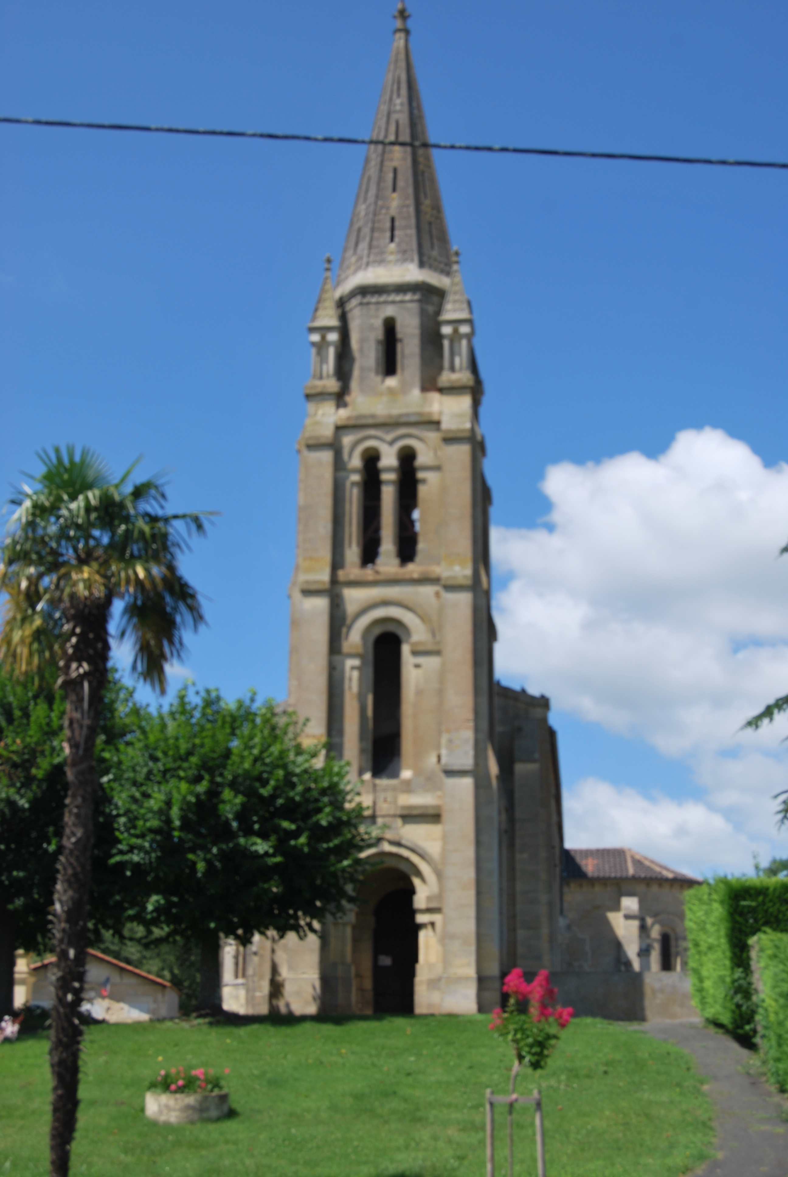 Église Saint-Michel de Civrac-sur-Dordogne